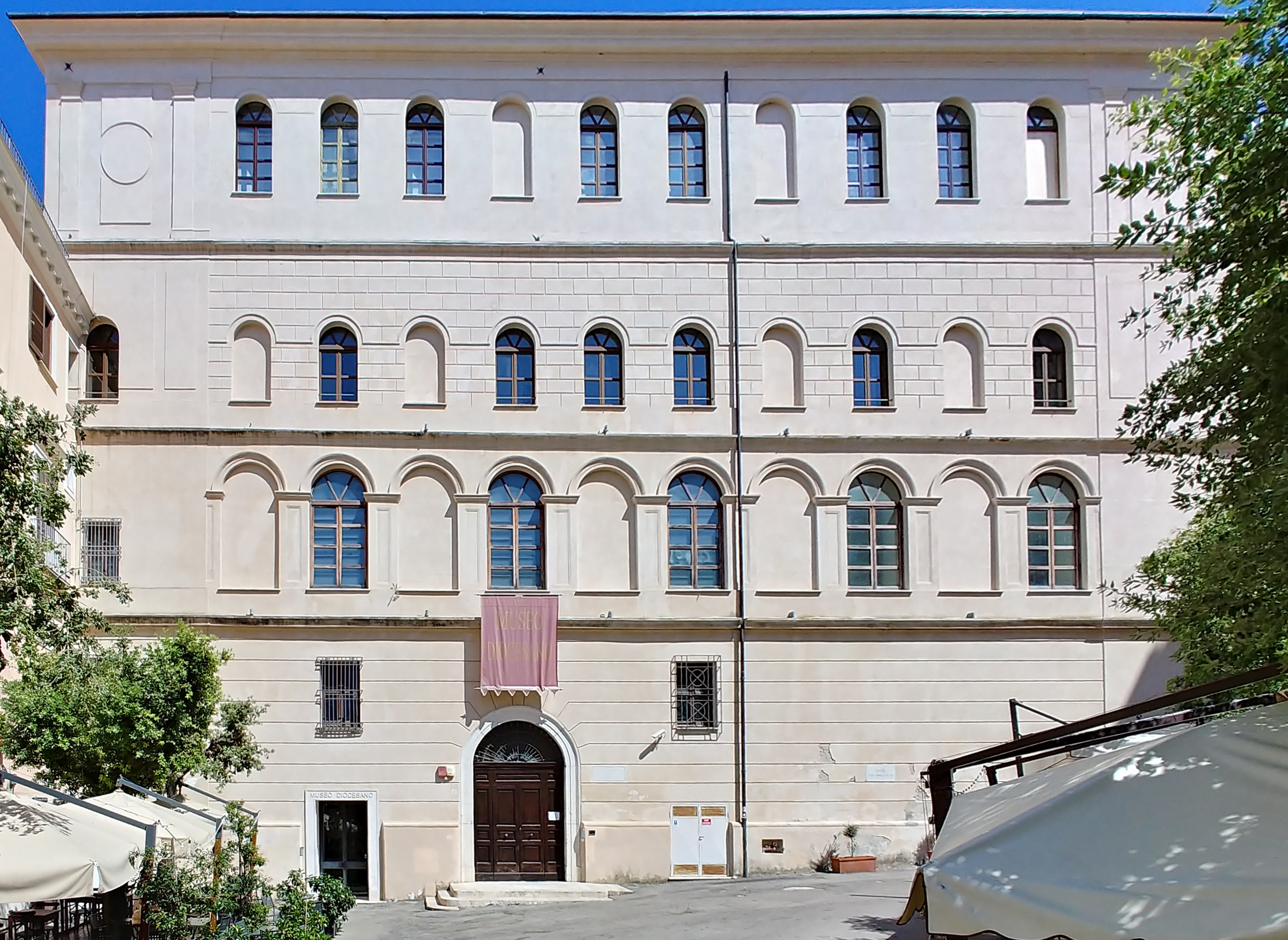 Facciata.